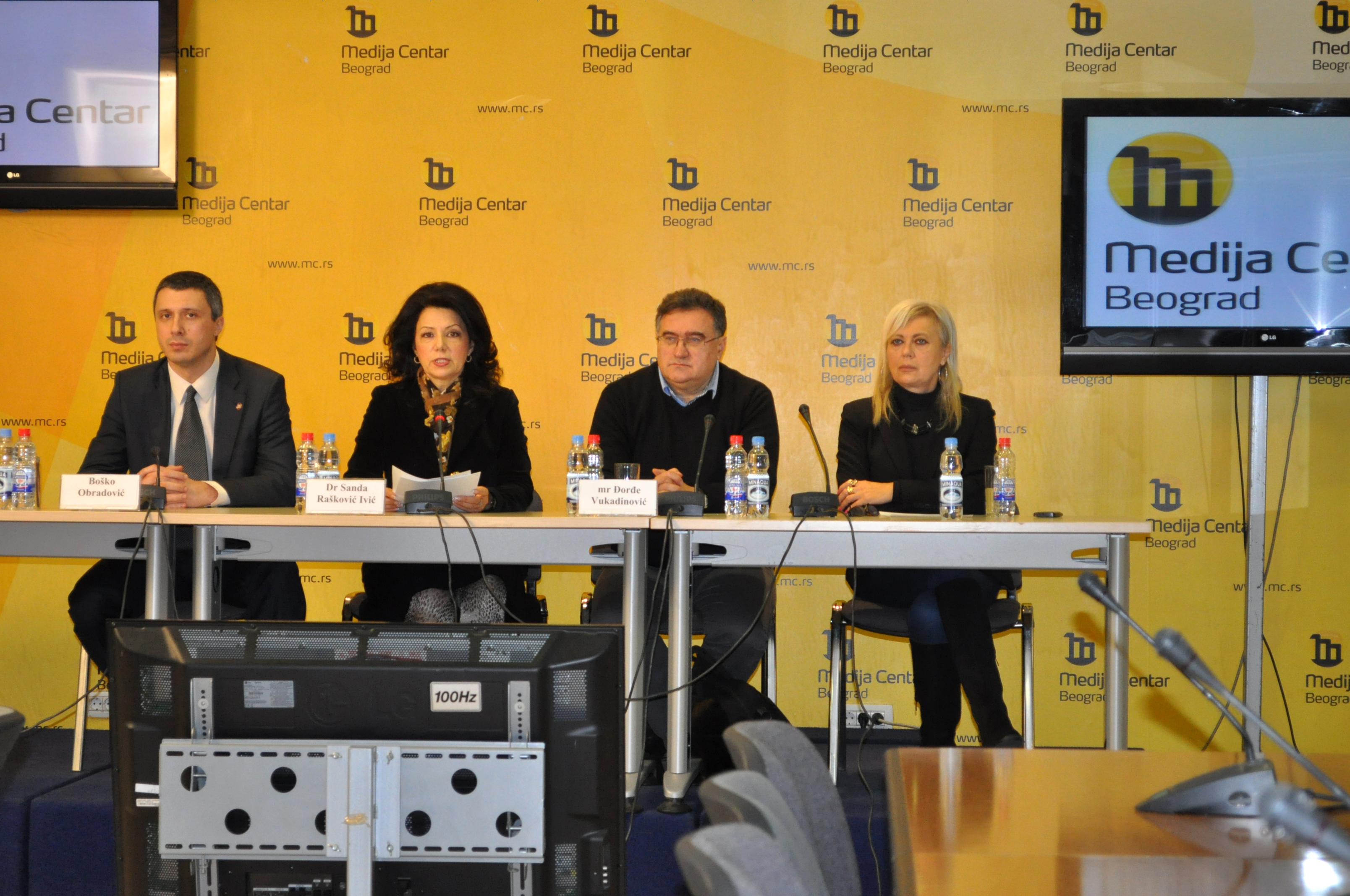 Peticija za raspisivanje referenduma o Evropskoj uniji